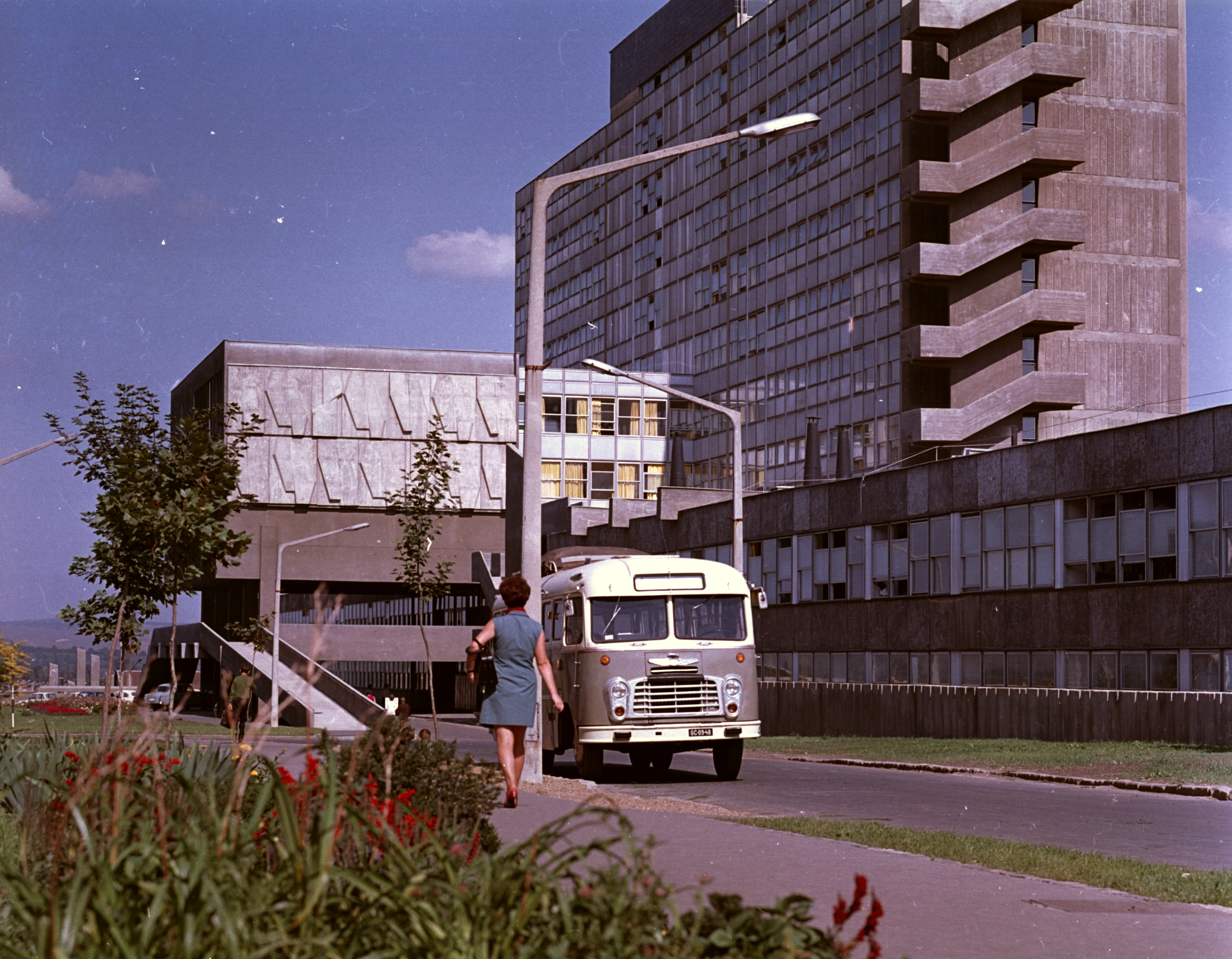 Május 1. út 56. Városi Kórház (ma Debreceni Egyetem Kazincbarcikai Kórháza). Location: Hungary Tags: bus, medical institution, colorful, Hungarian brand, Ikarus-brand Title: Május 1. út 56. Városi Kórház (ma Debreceni Egyetem Kazincbarcikai Kórháza).